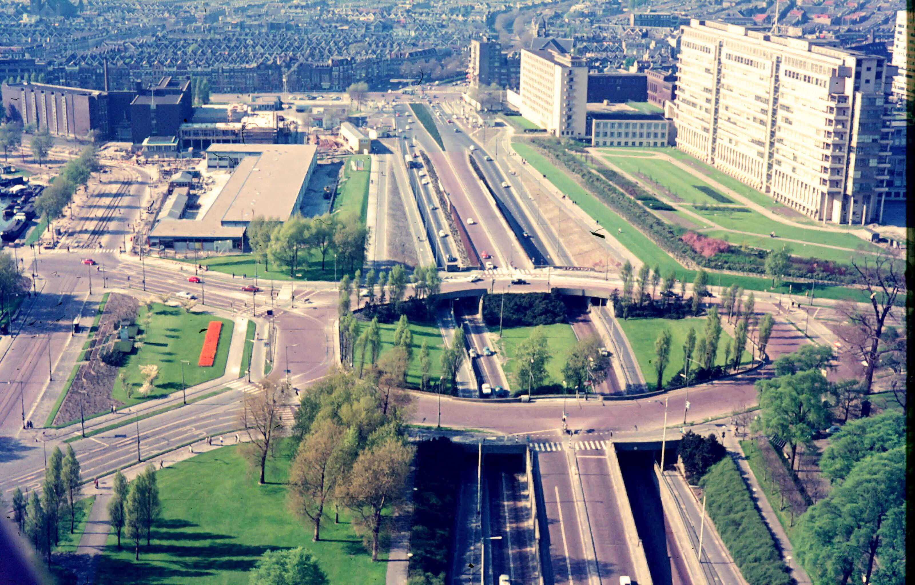 Rotterdam, tunneltraverse tussen Het Park en de Rochussenstraat, rechts: Ziekenhuis Dijkzigt (thans: Erasmus MC), 1966